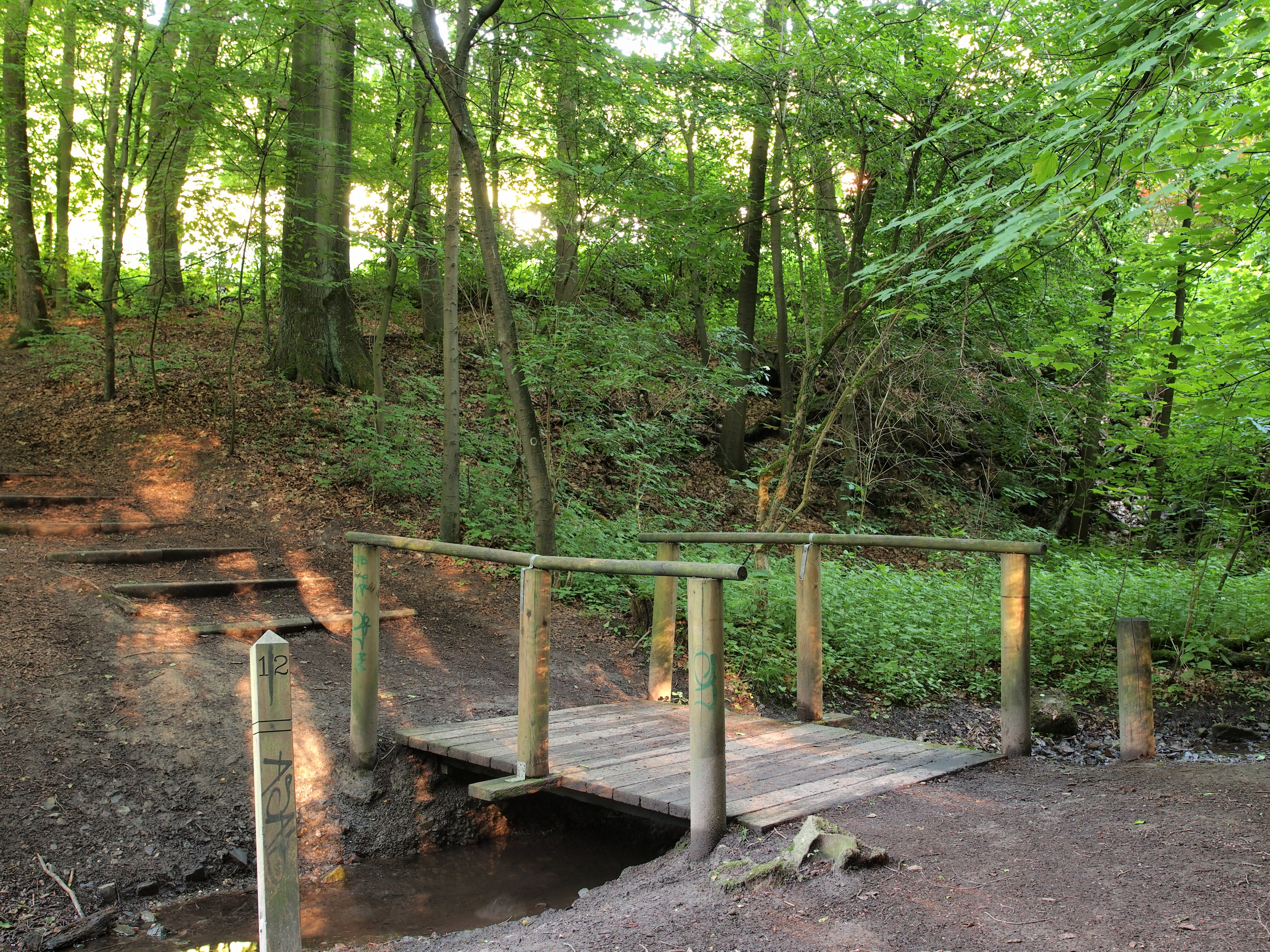 Naturschutzgebiet Langeloh - In der Hemke in Herne, Brücke über den Roßbach